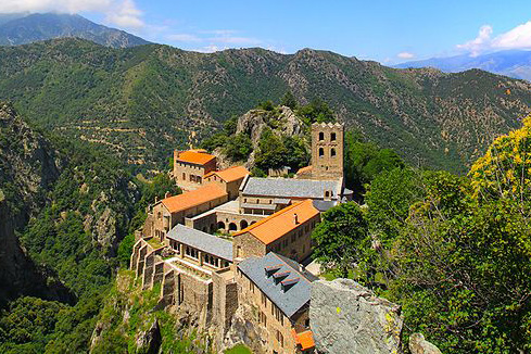 Abbaye Saint-Martin du Canigou, Übersicht von S